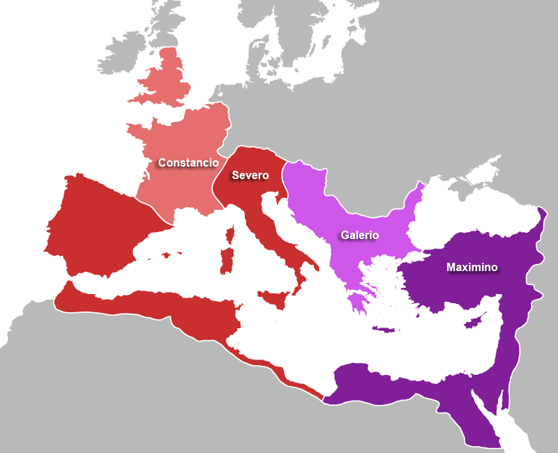 Imperio romano en 305. Territorios correspondientes a los tetrarcas.